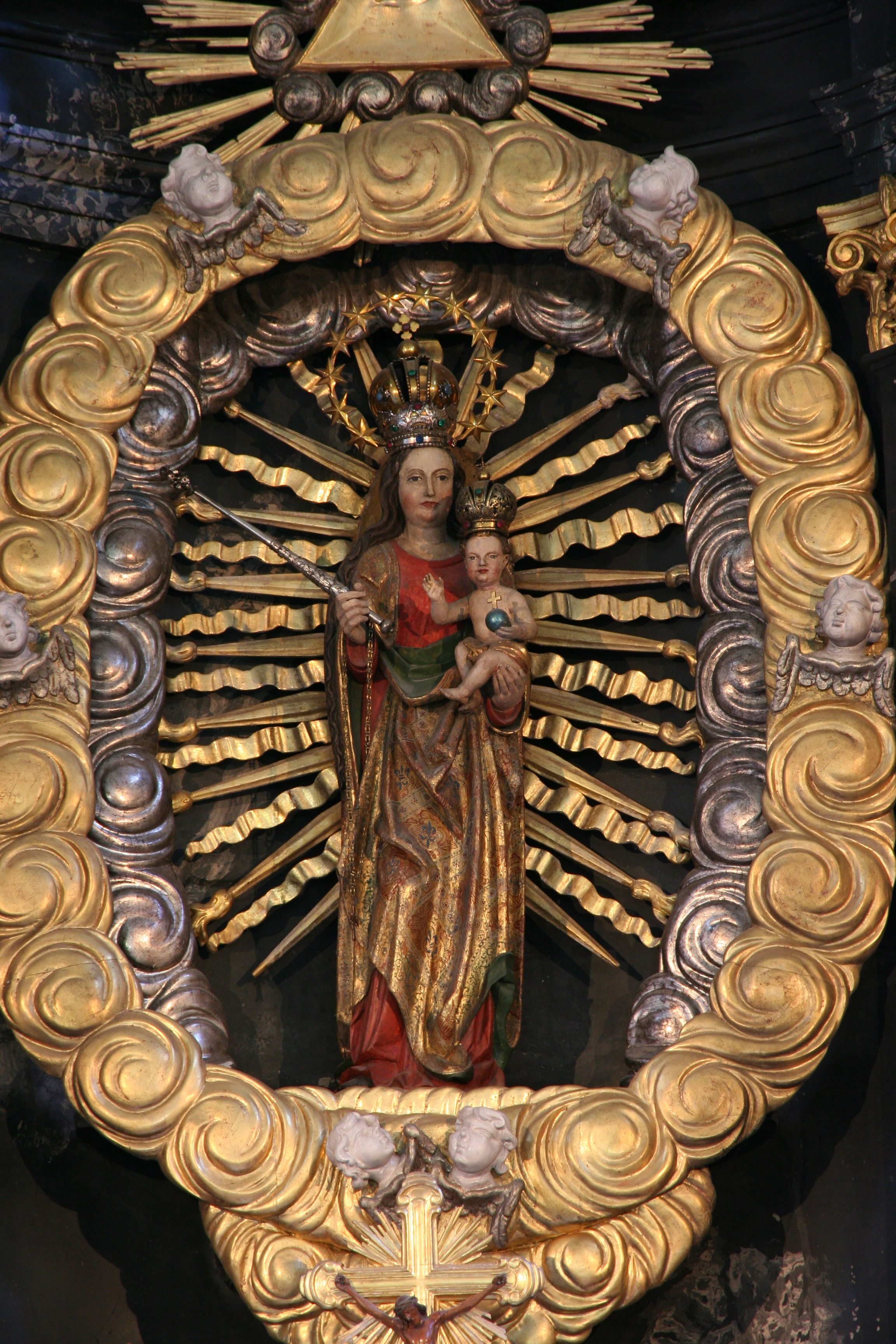 Wallfahrskapelle Jonental